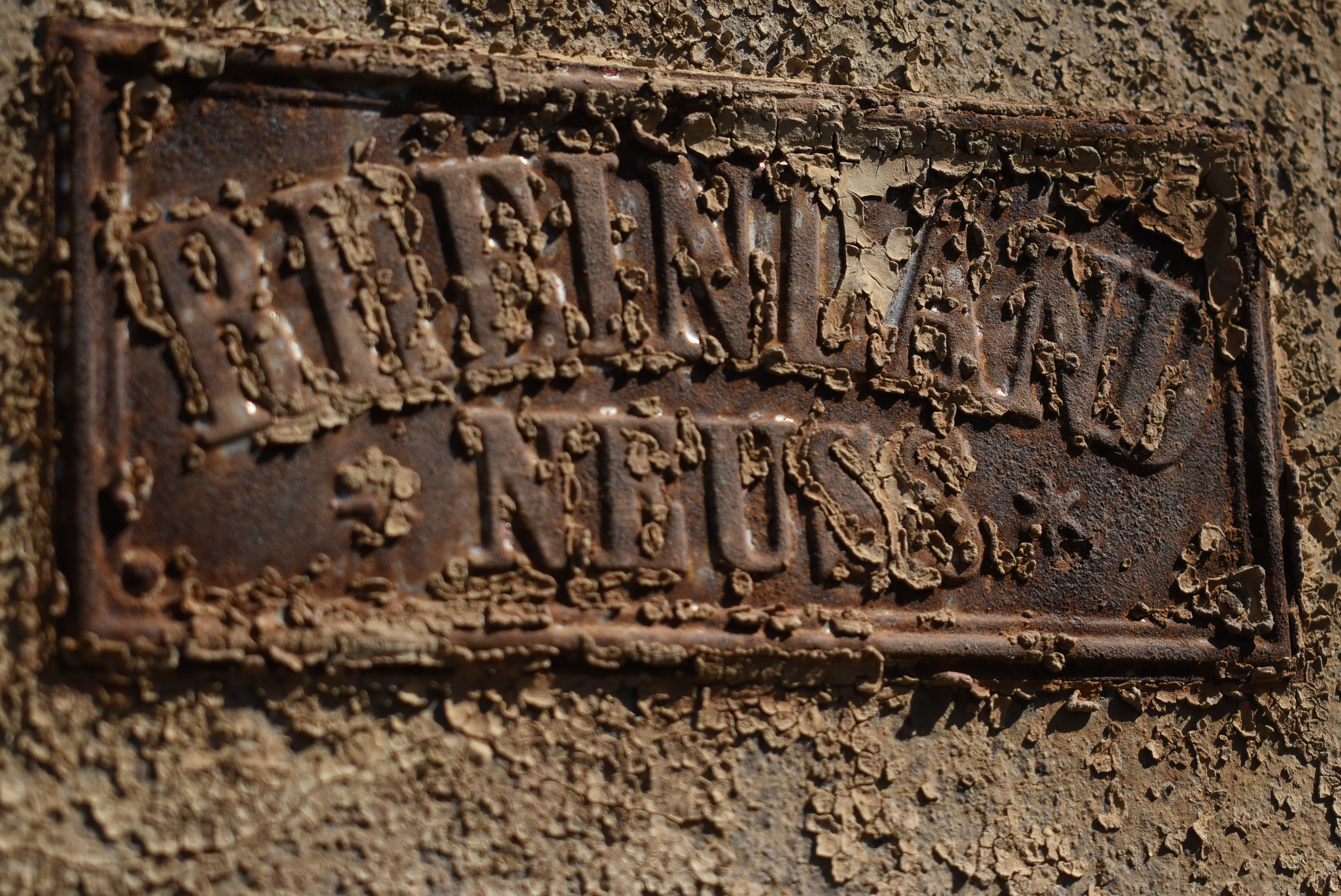 Schild der Feuerversicherung "Rheinland Neuss" am Haus Am Puttenser Felde 6 in Hannover aus der Nähe, schattig